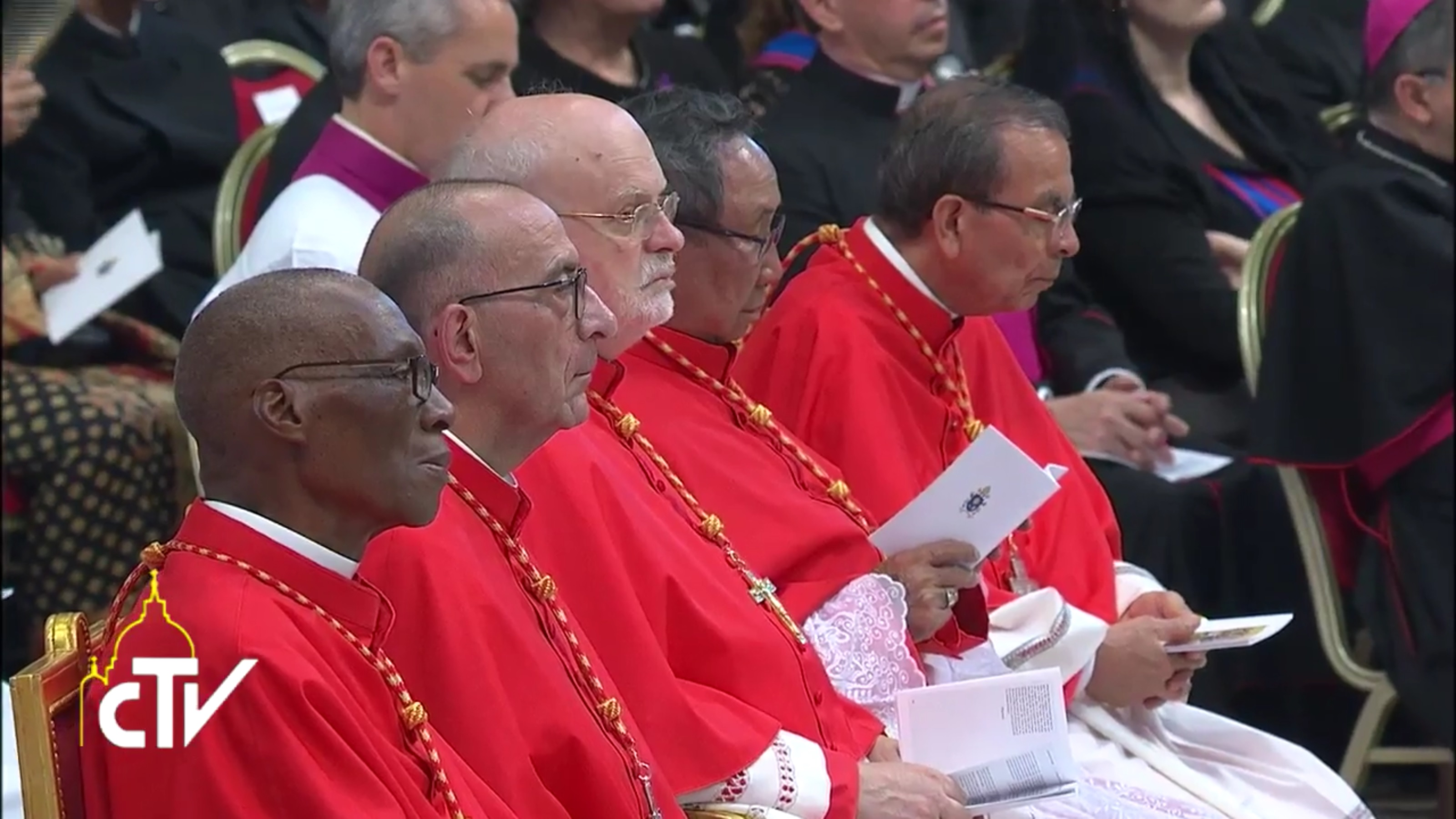 I futuri cardinali Jean Zerbo, Juan José Omella Omella, Anders Arborelius, Louis-Marie Ling Mangkhanekhoun e Gregorio Rosa Chávez prima della loro consegna della berretta cardinalizia nel Concistoro del 28 giugno 2017, presieduto da Papa Francesco.